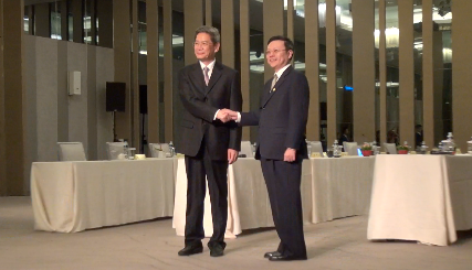 2014 Wang-Zhang Meeting 张志军和王郁琦在第二次两岸事务首长会议前握手致意（美国之音张佩芝拍摄）